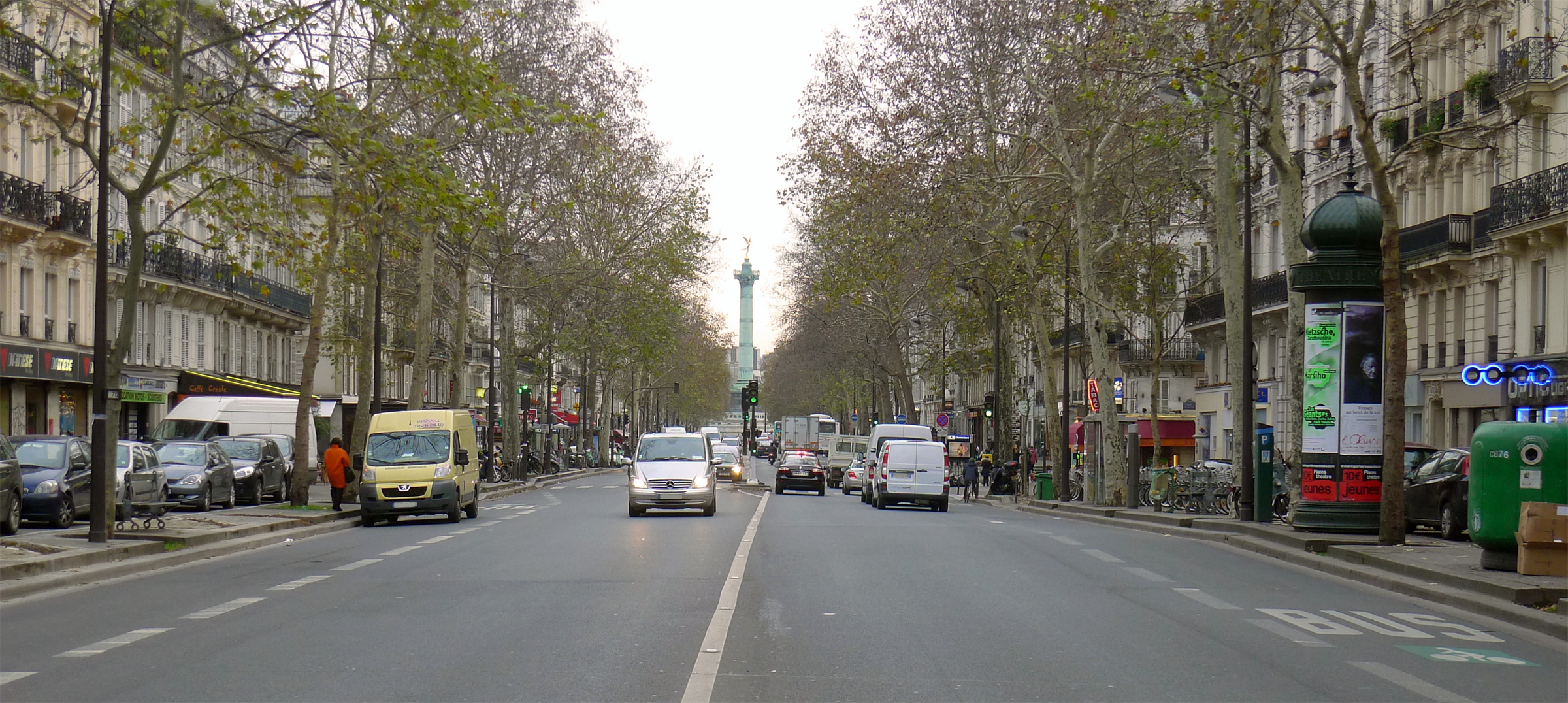 Boulevard Beaumachais avec la colonne de la Bastille en arrière-plan - Paris III-IV-XI